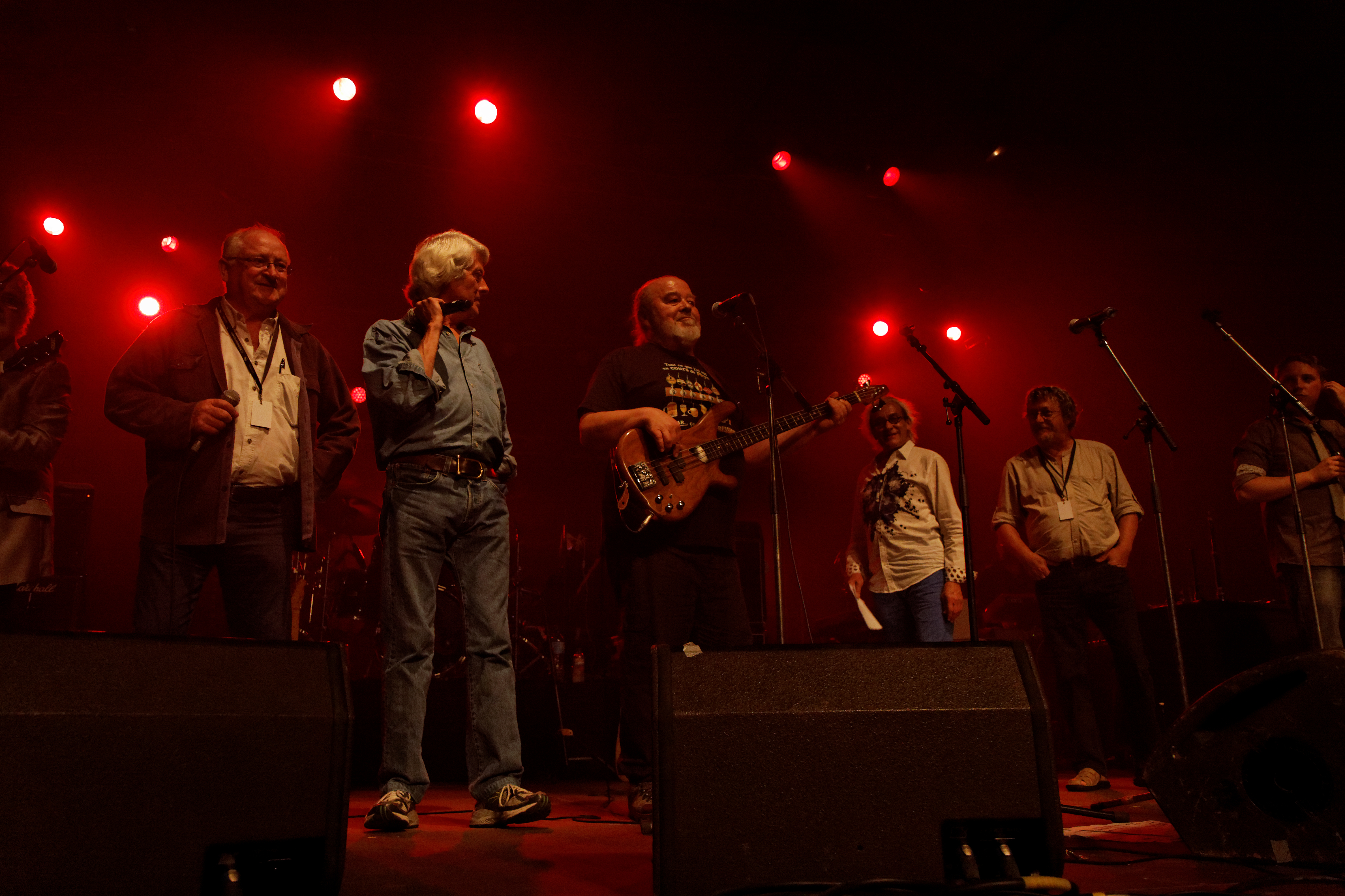 Les Sonerien Du fêtent leurs 40 ans en concert à l'espace Gradlon lors du festival de Cornouaille 2012. Tri Yann accompagne les Sonerien sur scène.